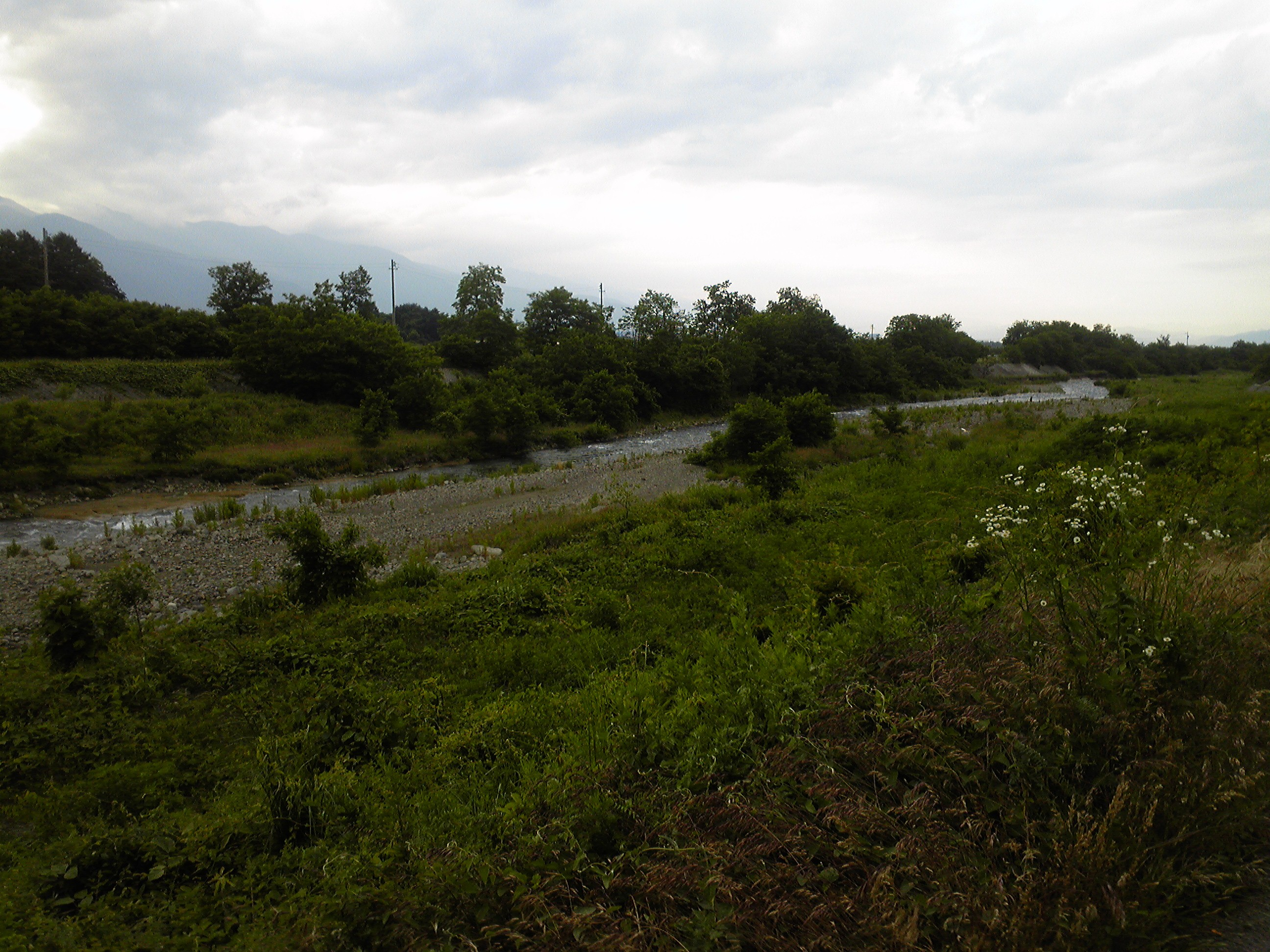 鎖川。長野県松本市大字今井、赤坂橋付近より下流方向。